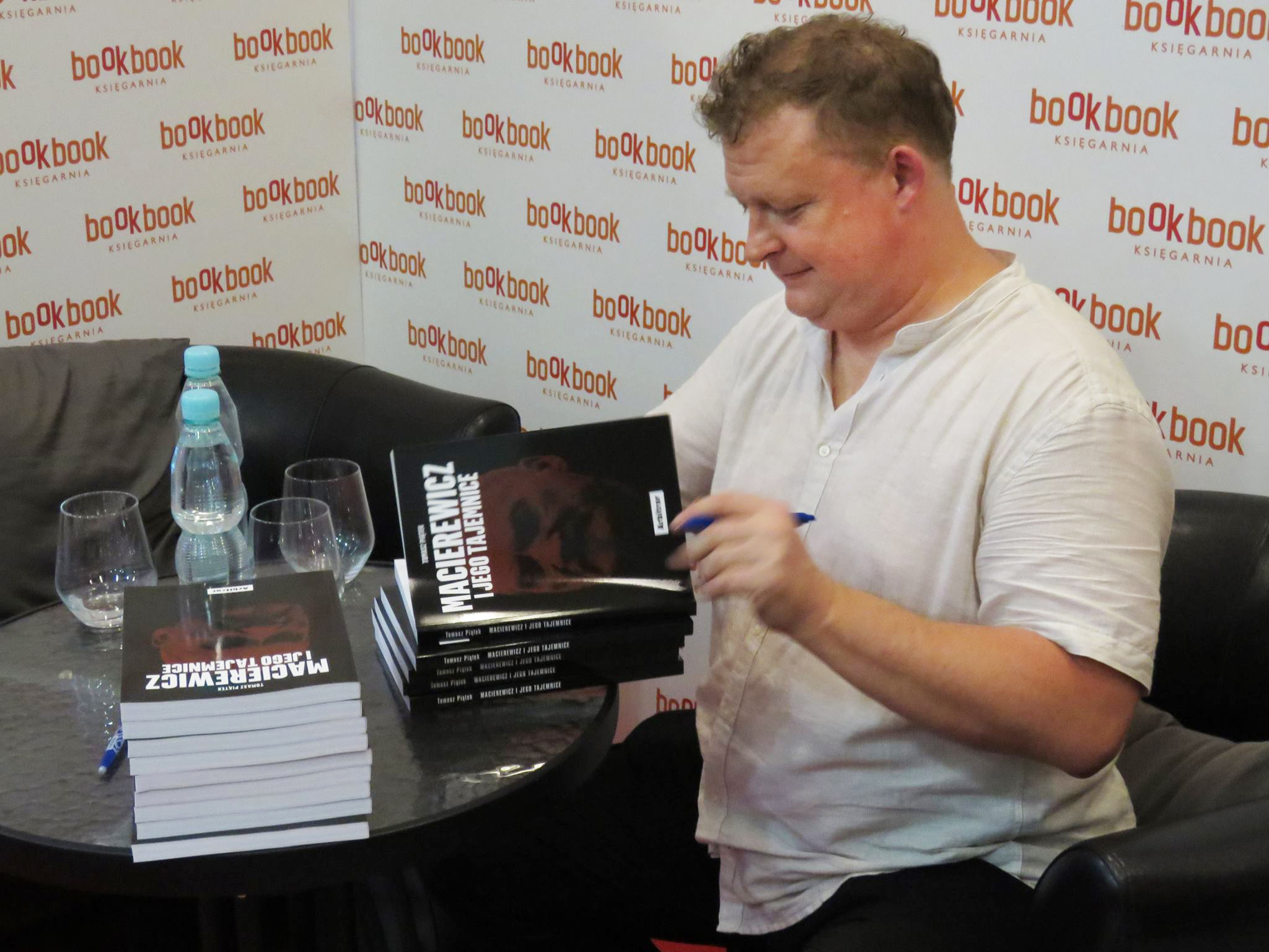 Tomasz Piatek (b. March 16, 1974 in Pruszkow, Poland) - Polish writer.